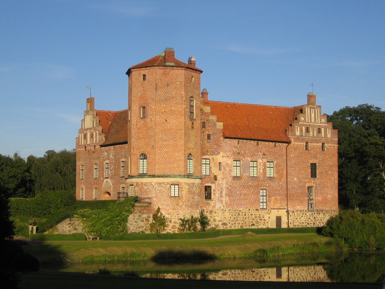 Torups slott. Bilden tagen av mig själv 18 augusti 2005.